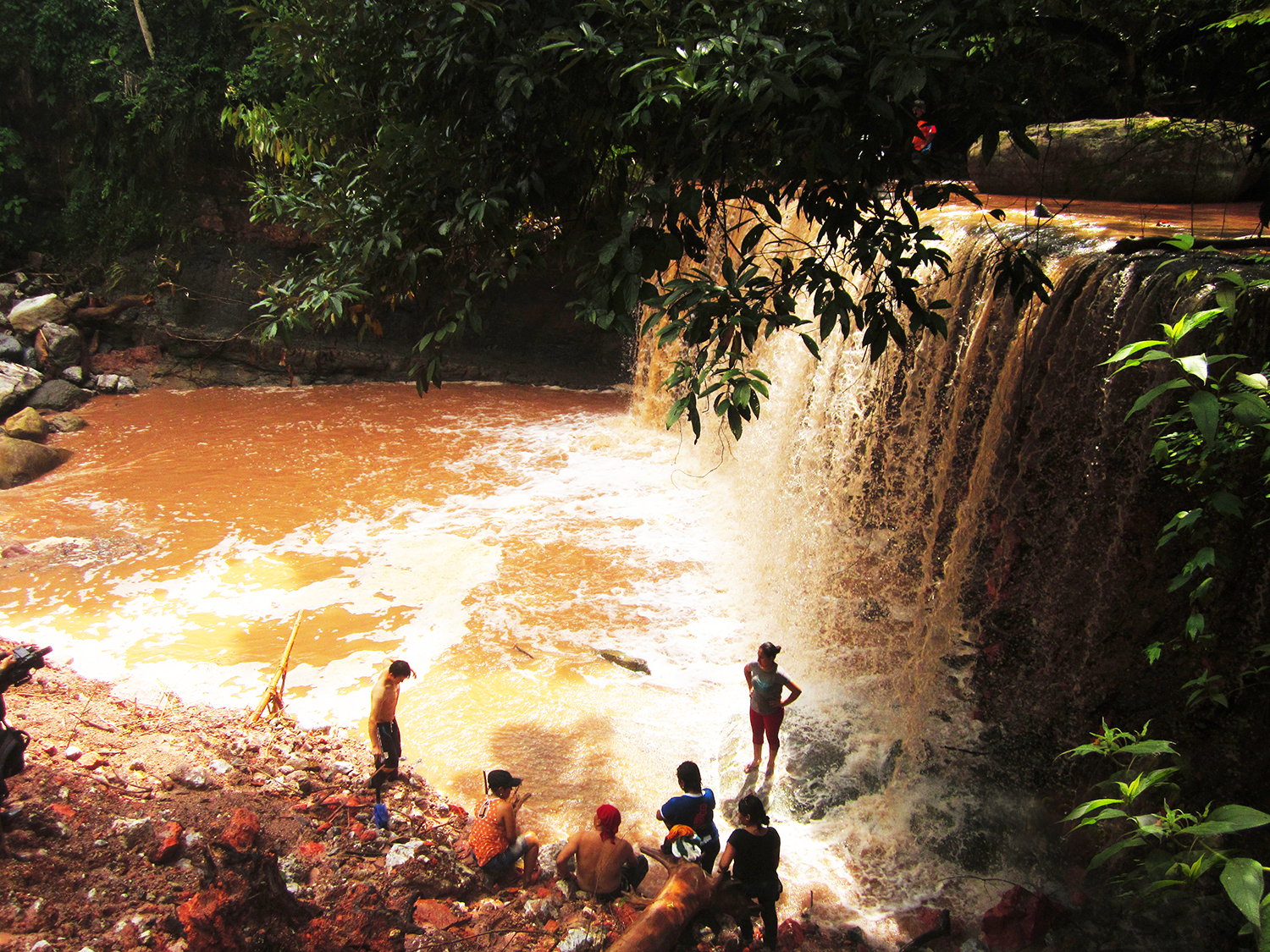 Cascada Cortina